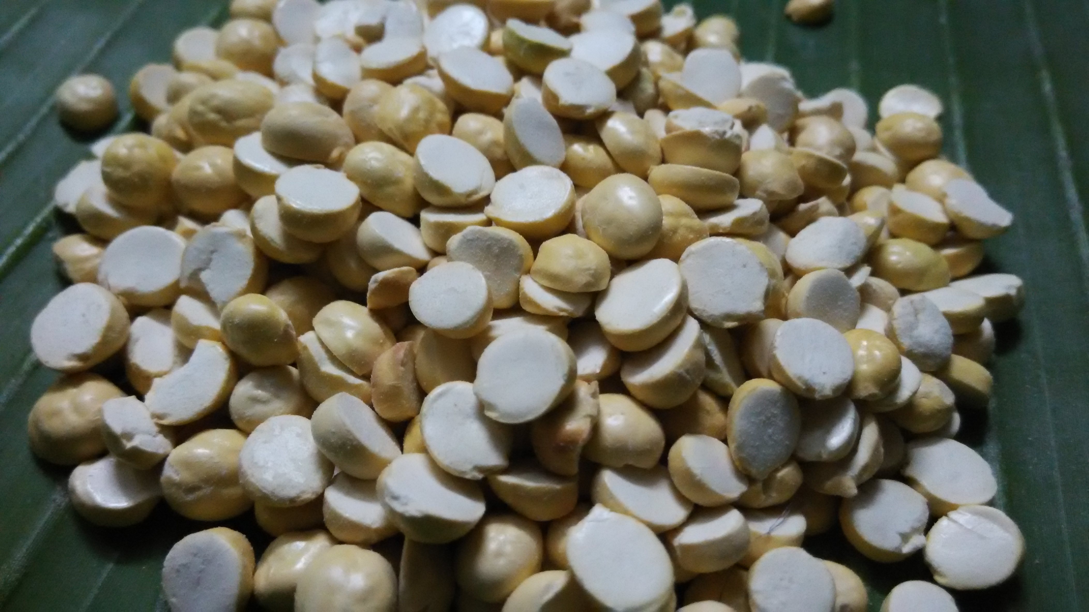 வறுகடலை.